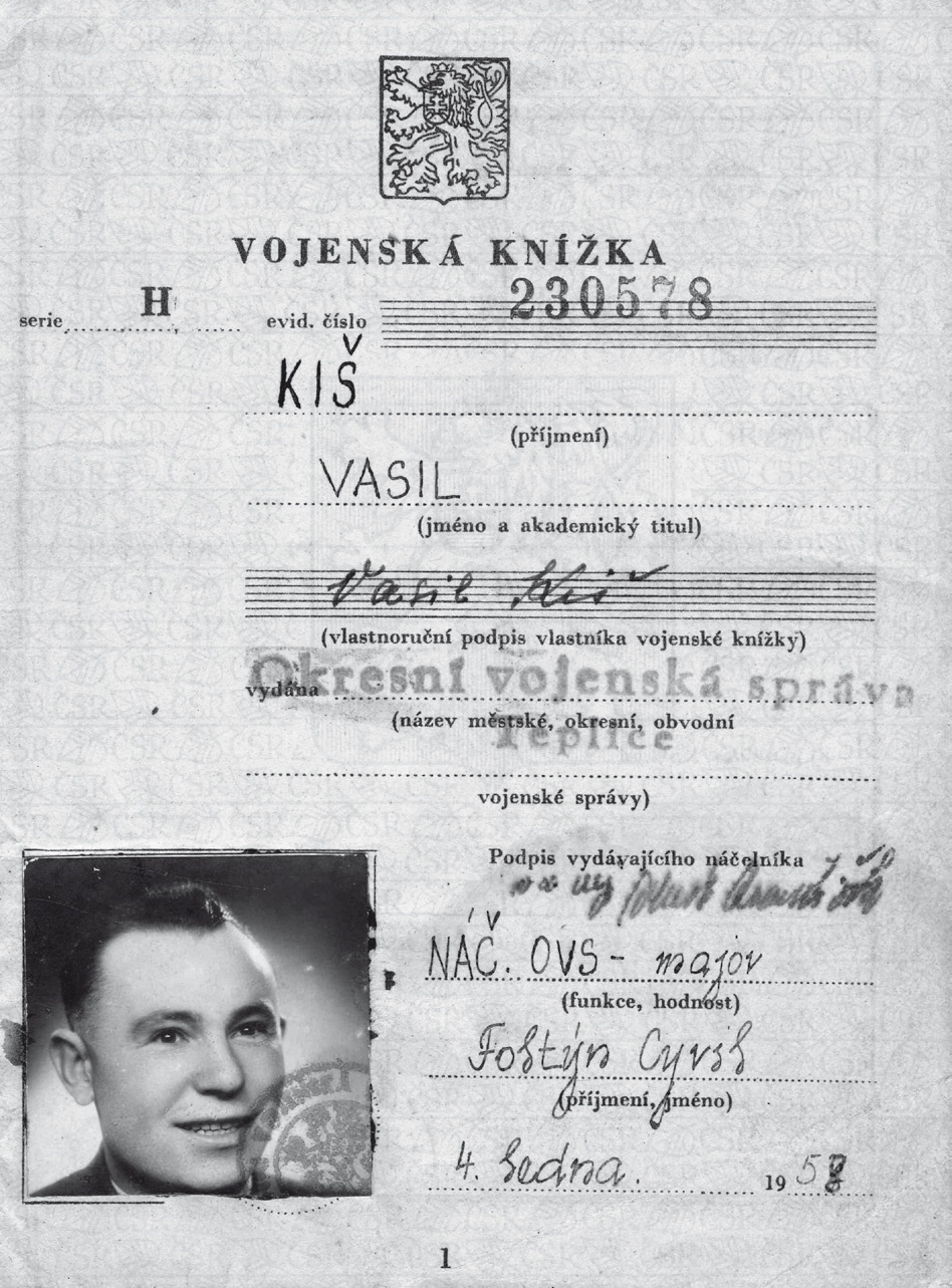 Kopie první strany vojenské knížky Vasila Kiše, H8-17536